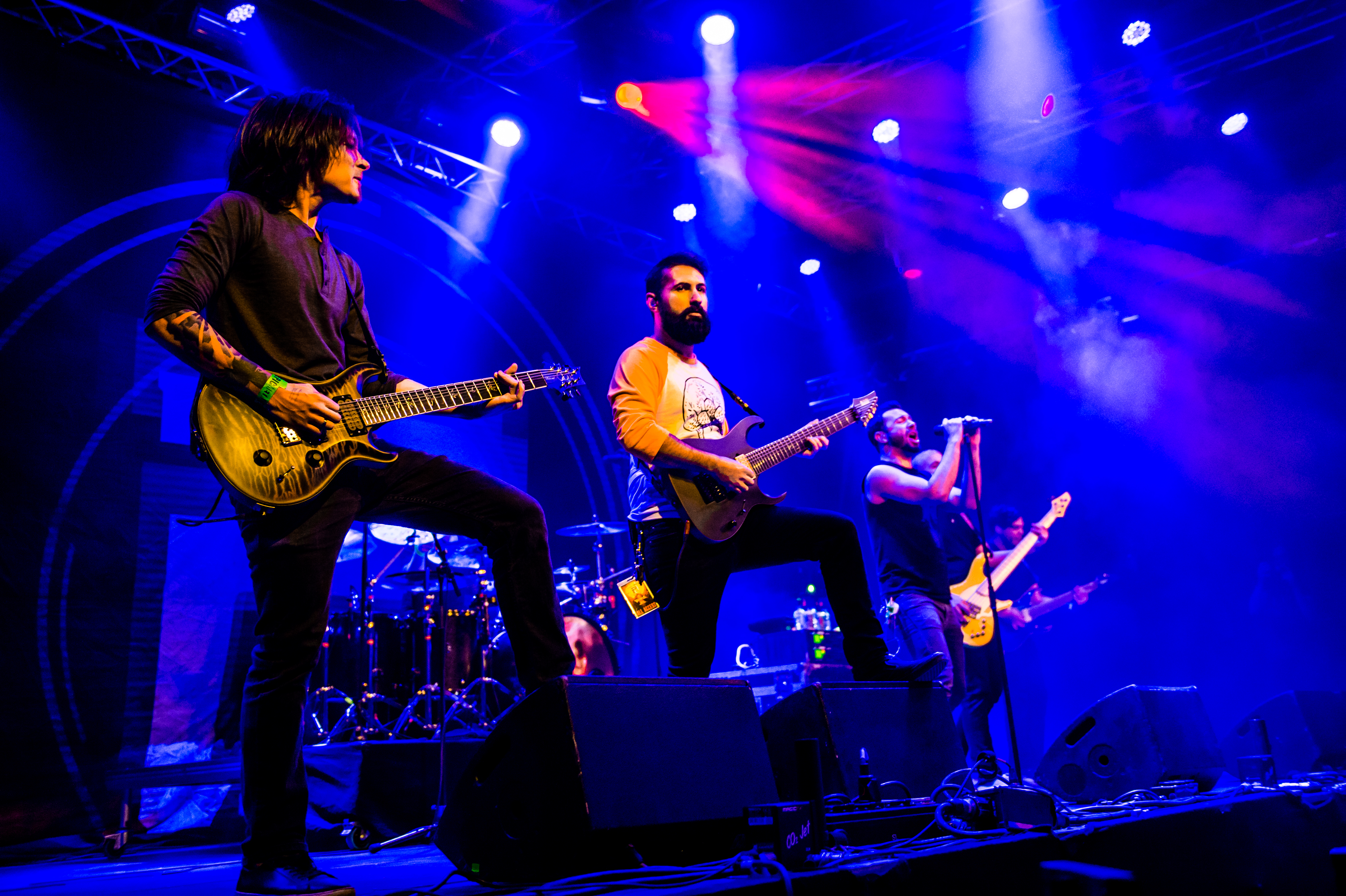 'Periphery - Epic Metal Fest - Eindhoven'